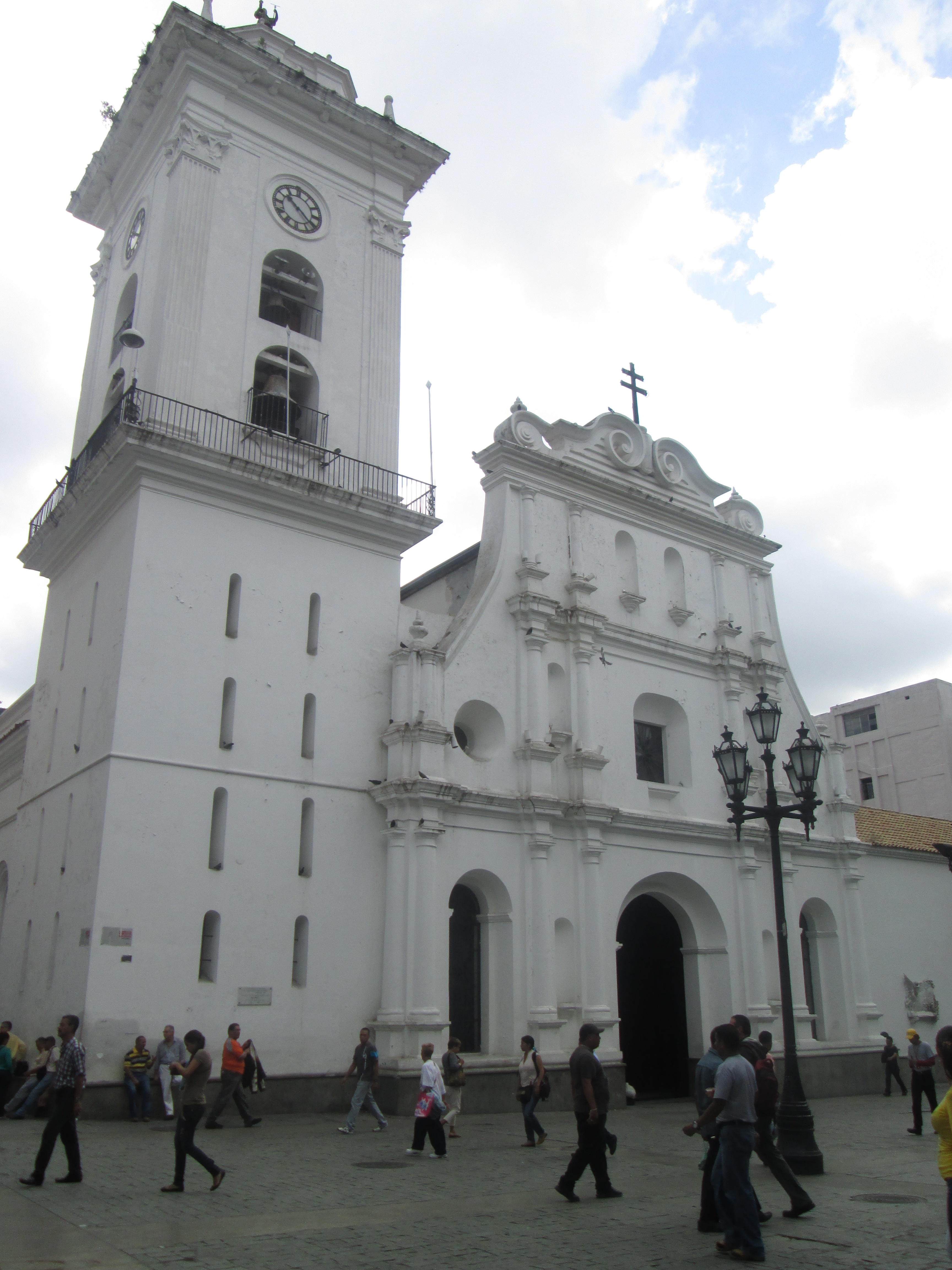 Catedral de Caracas ubicada en el Centro de la Ciudad